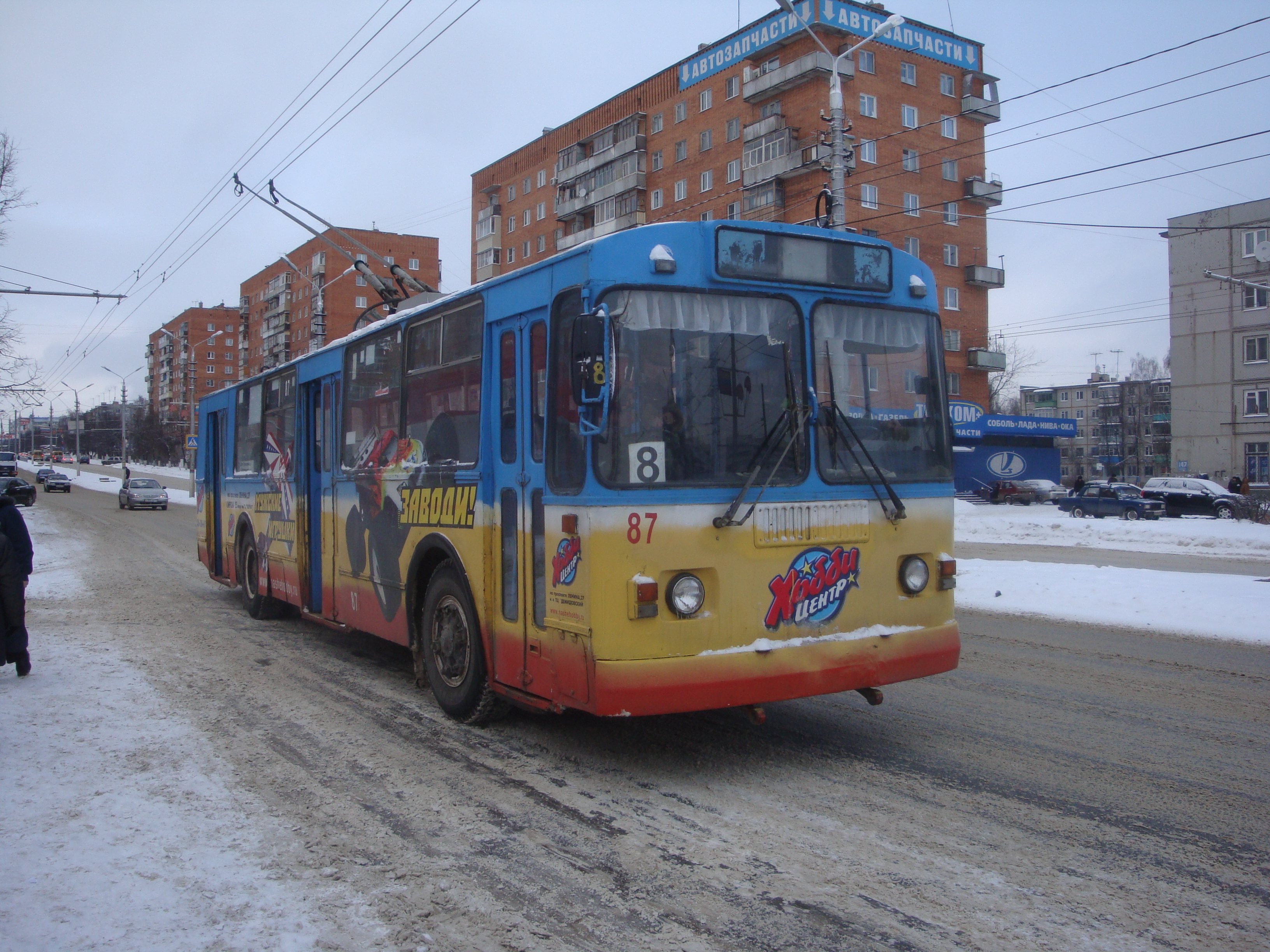 ЗиУ-682 на линии в Криволучье